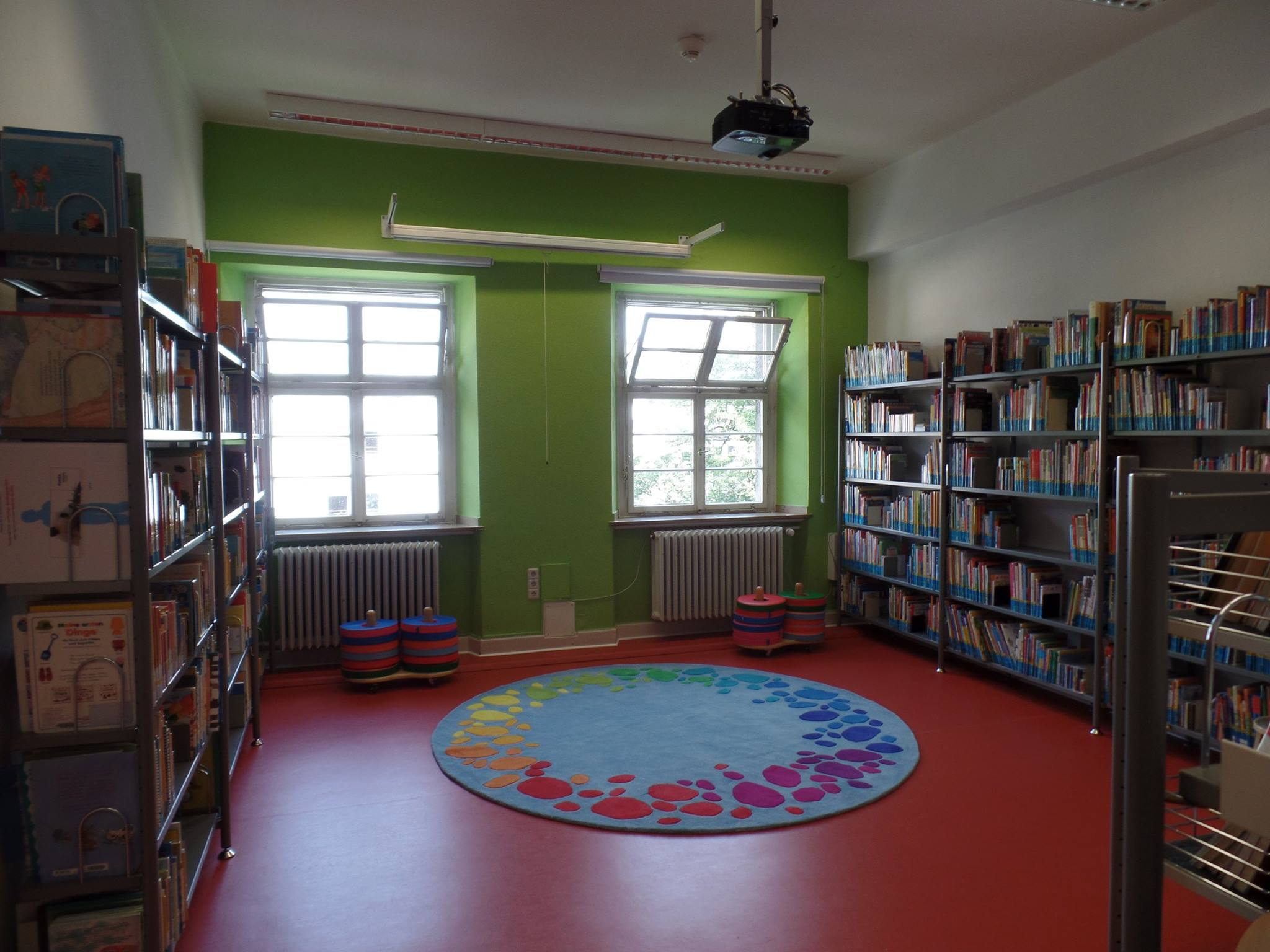 Der neue Veranstaltungsraum im Bücherschiff